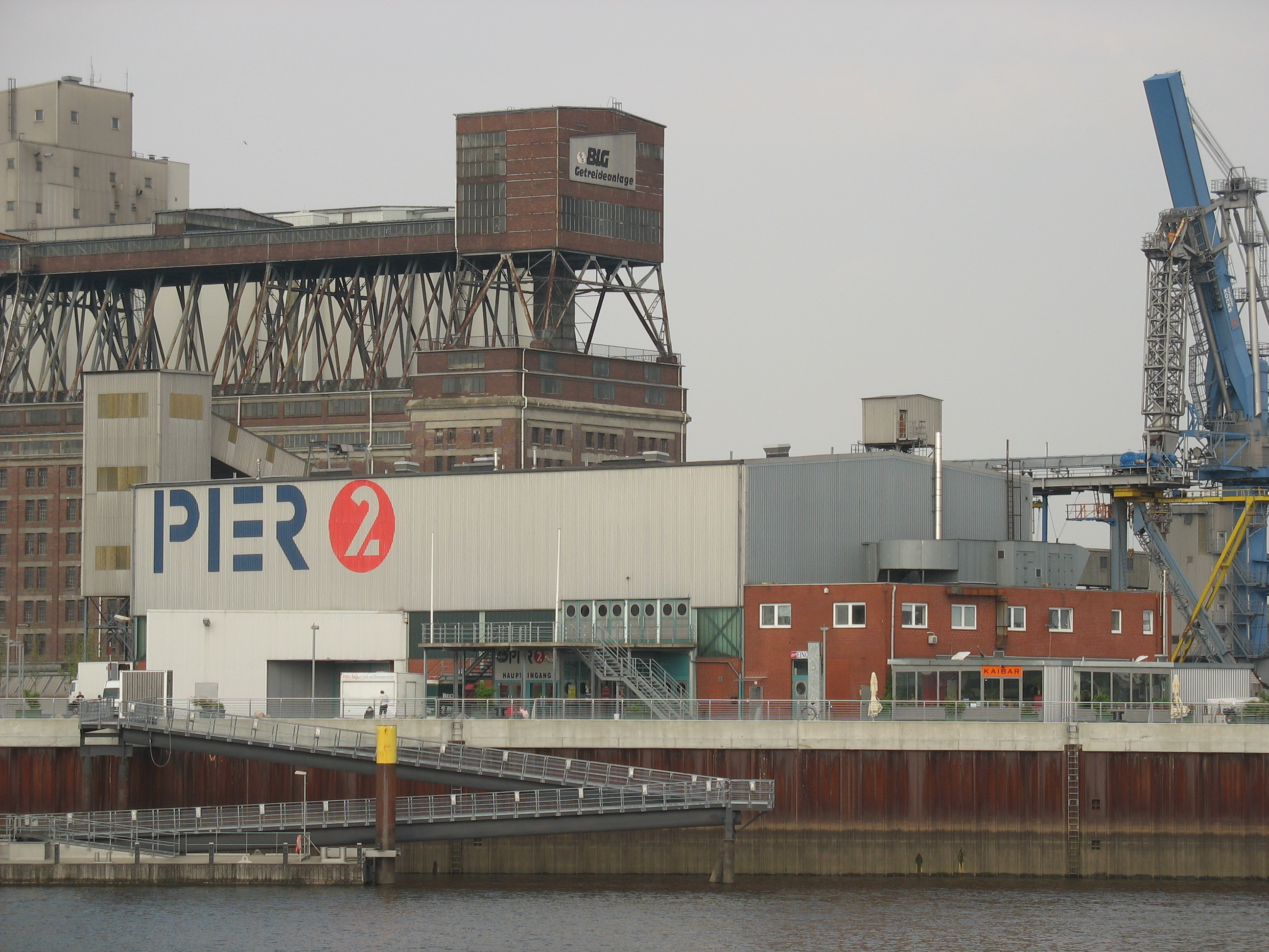 Pier 2, Gröpelingen, Bremen, Germany